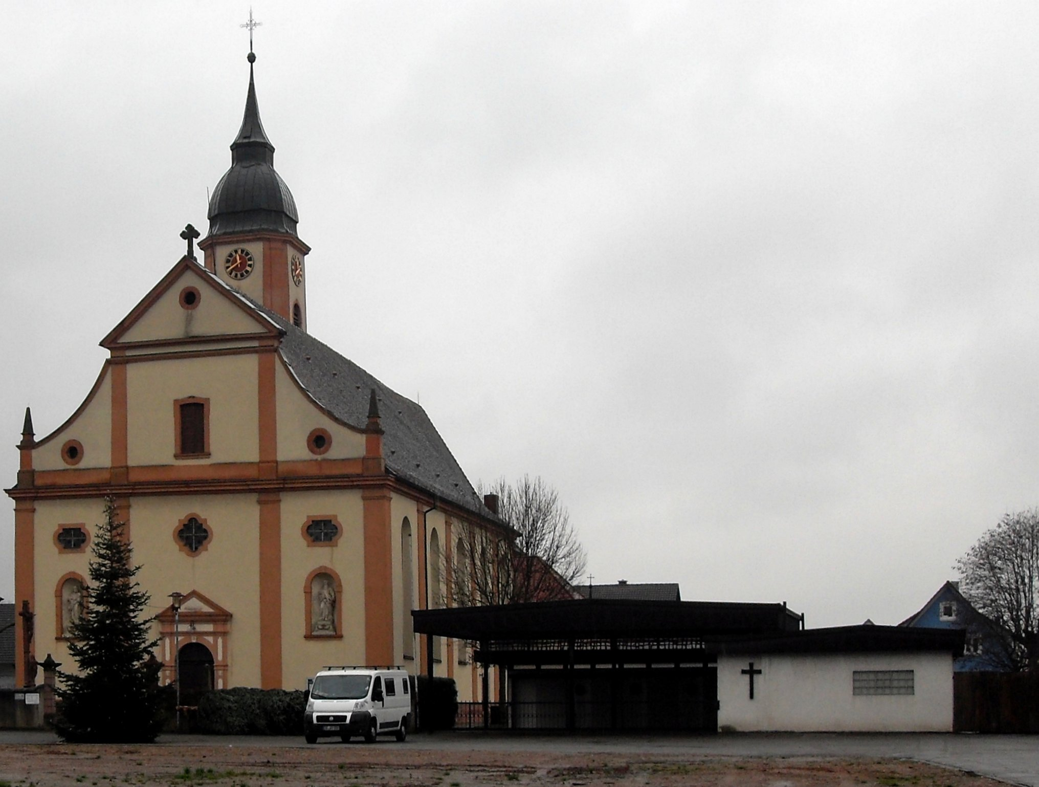 Pfarrkirche St. Johann Baptist in Ringsheim, Deutschland